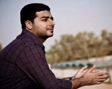 الفنان علي عبدالله